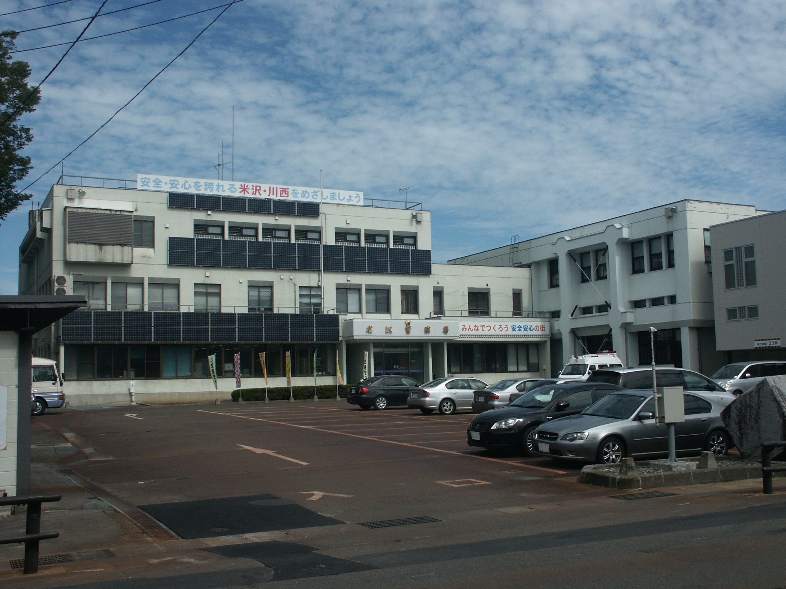 山形県米沢警察署庁舎